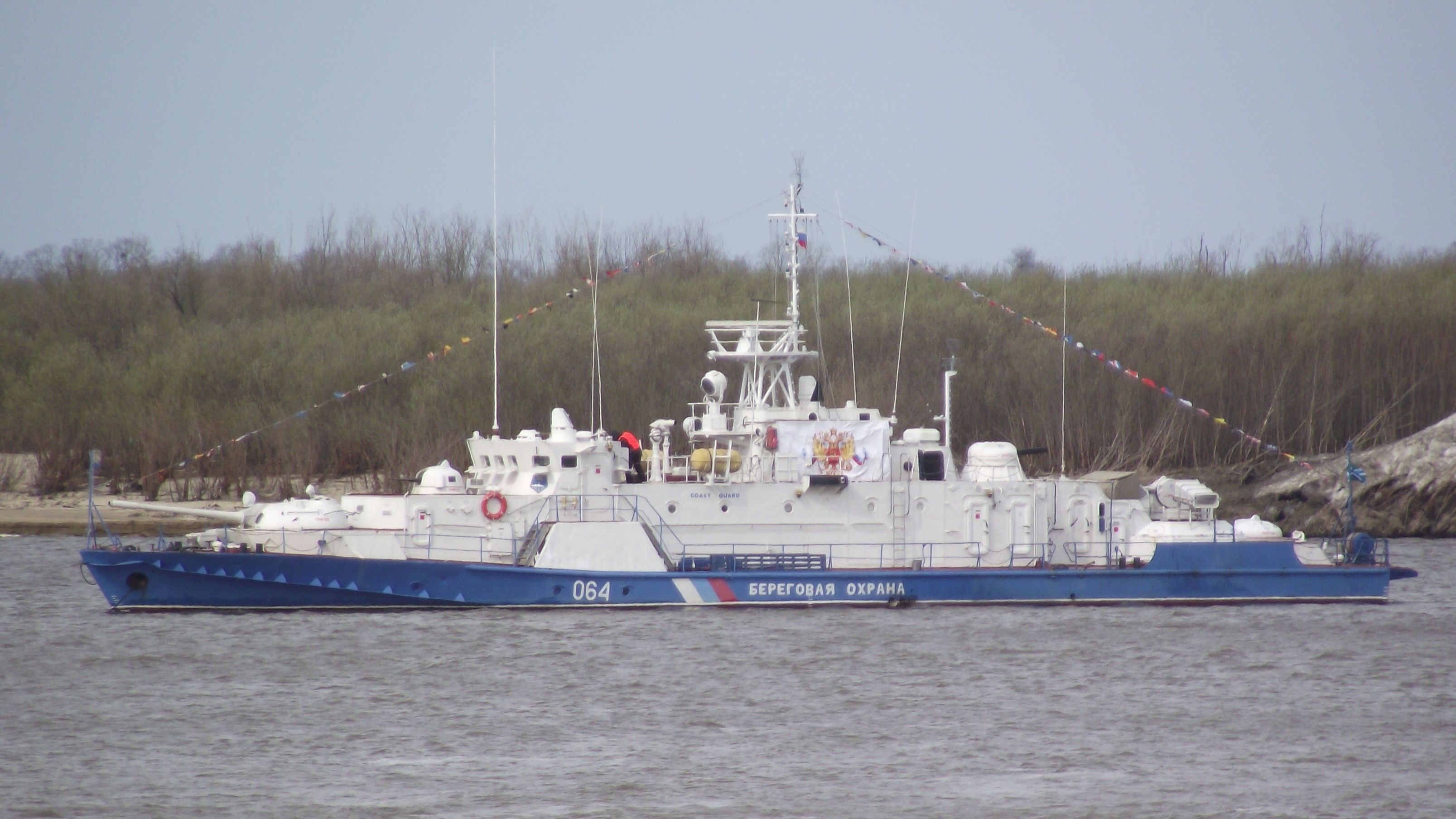 Корабль Амурской флотилии